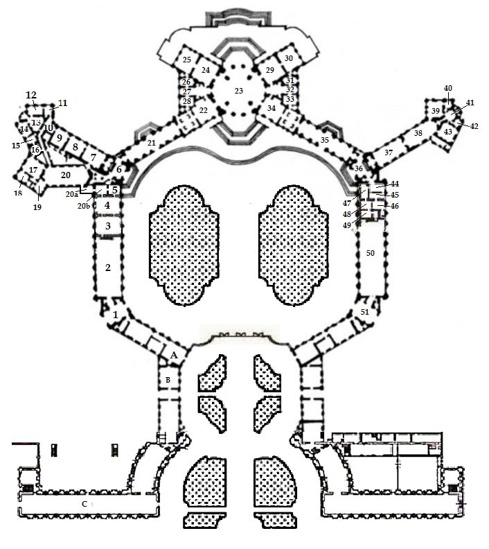 Pianta della Palazzina di caccia di Stupinigi con dependances e numerazione esplicativa